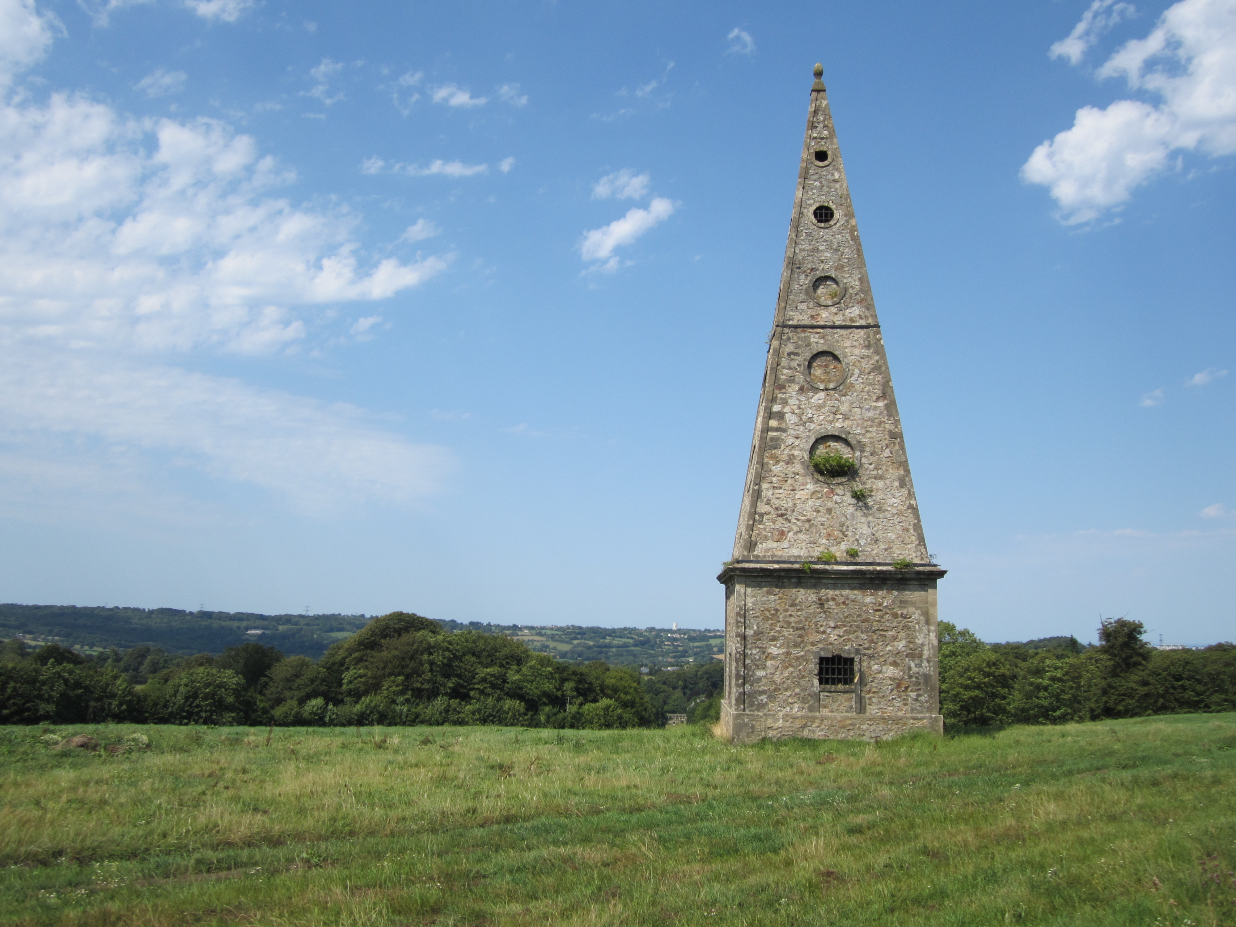 Gloriette construit au XVIIIe par les chatelins des Du Moncel à l'extrémité du parc du château de Martinvast .